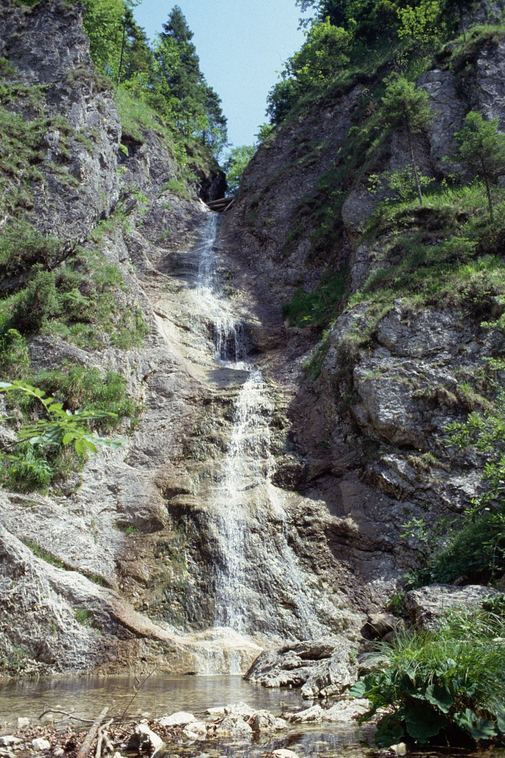 Der Schleierfall im Reichraminger Hintergebirge